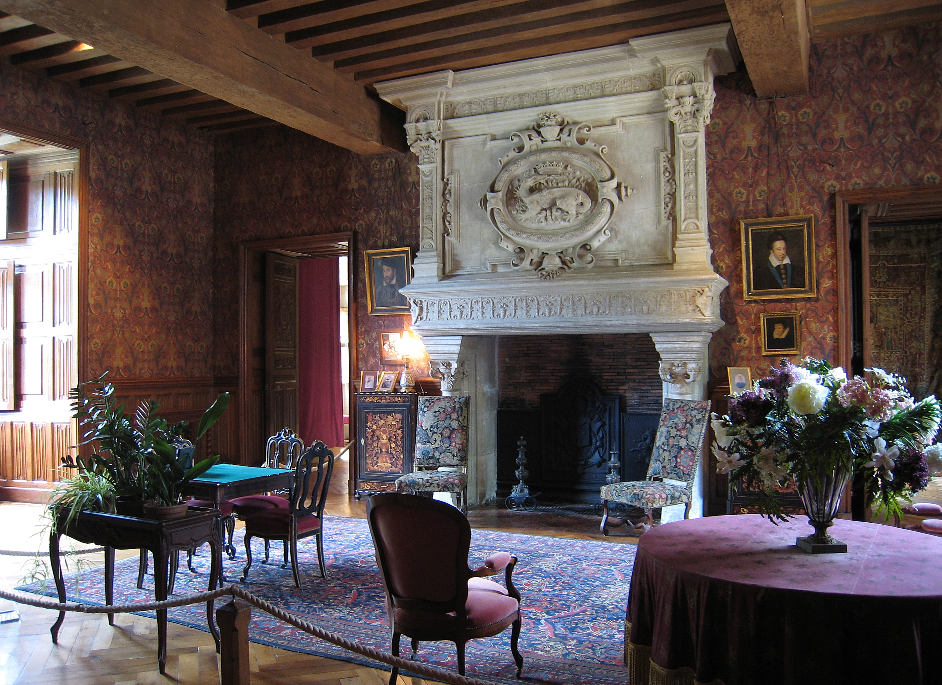 Salon Biencourt in the Château d'Azay-le-Rideau in the village of Azay le Rideau on the river Indre, Region Centre, Département Indre-et-Loire/France.